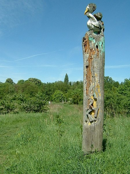 Eine der Stelen am Nordpark in Bonames,einem Stadtteil von FFM. Der Nordpark ist ein natürlich bewachsenes Freizeitgelände , umschlossen von einem Altarm der Nidda.